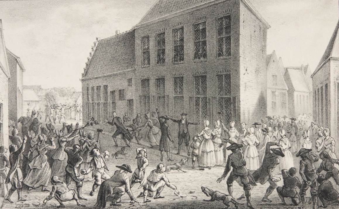 Afbeelding van het IJzerkoekenoproer in Coevorden in 1770 (lithografie)